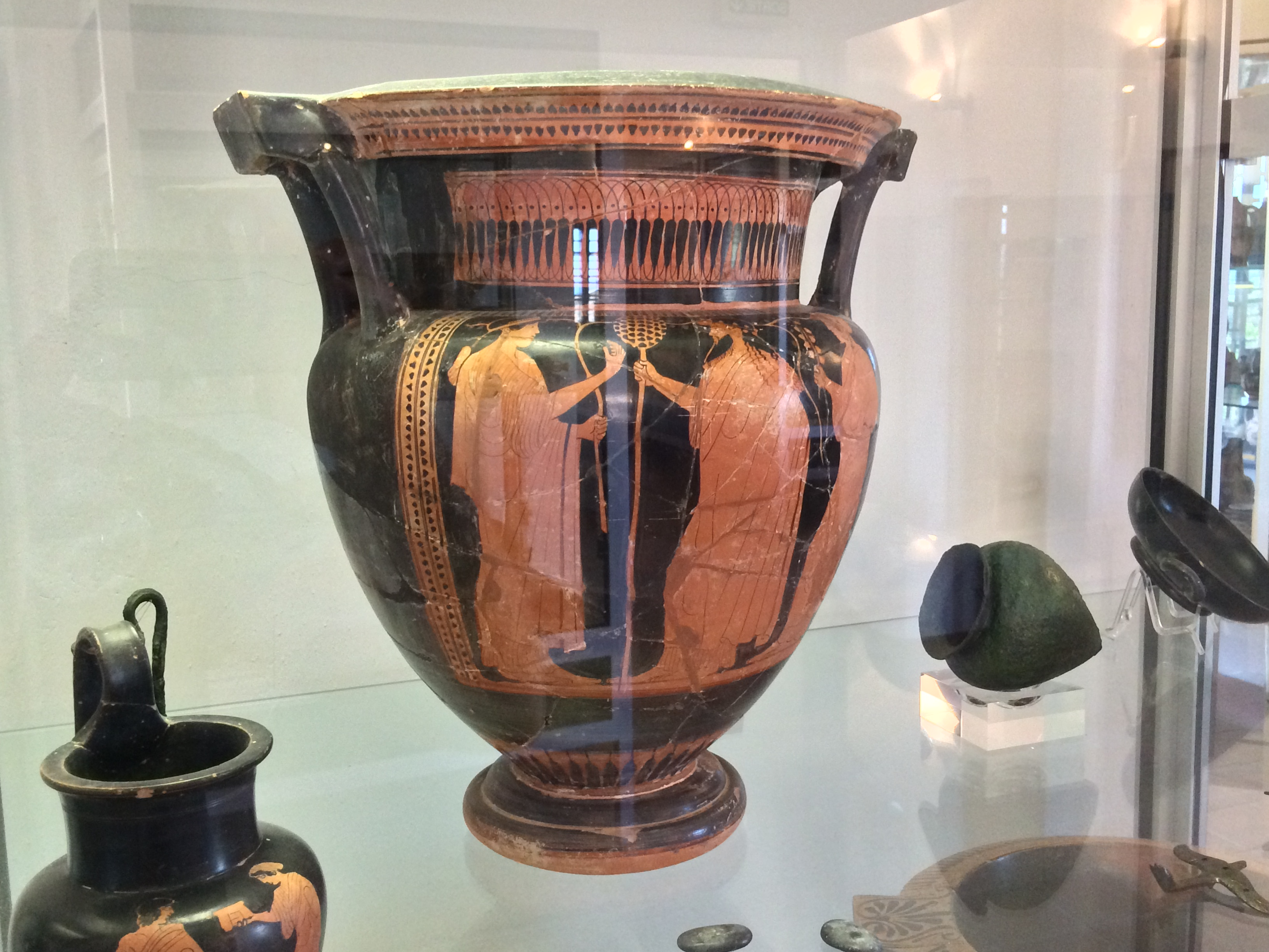 Cratère attique (5ème siècle av-J.C. représentant Dionysos